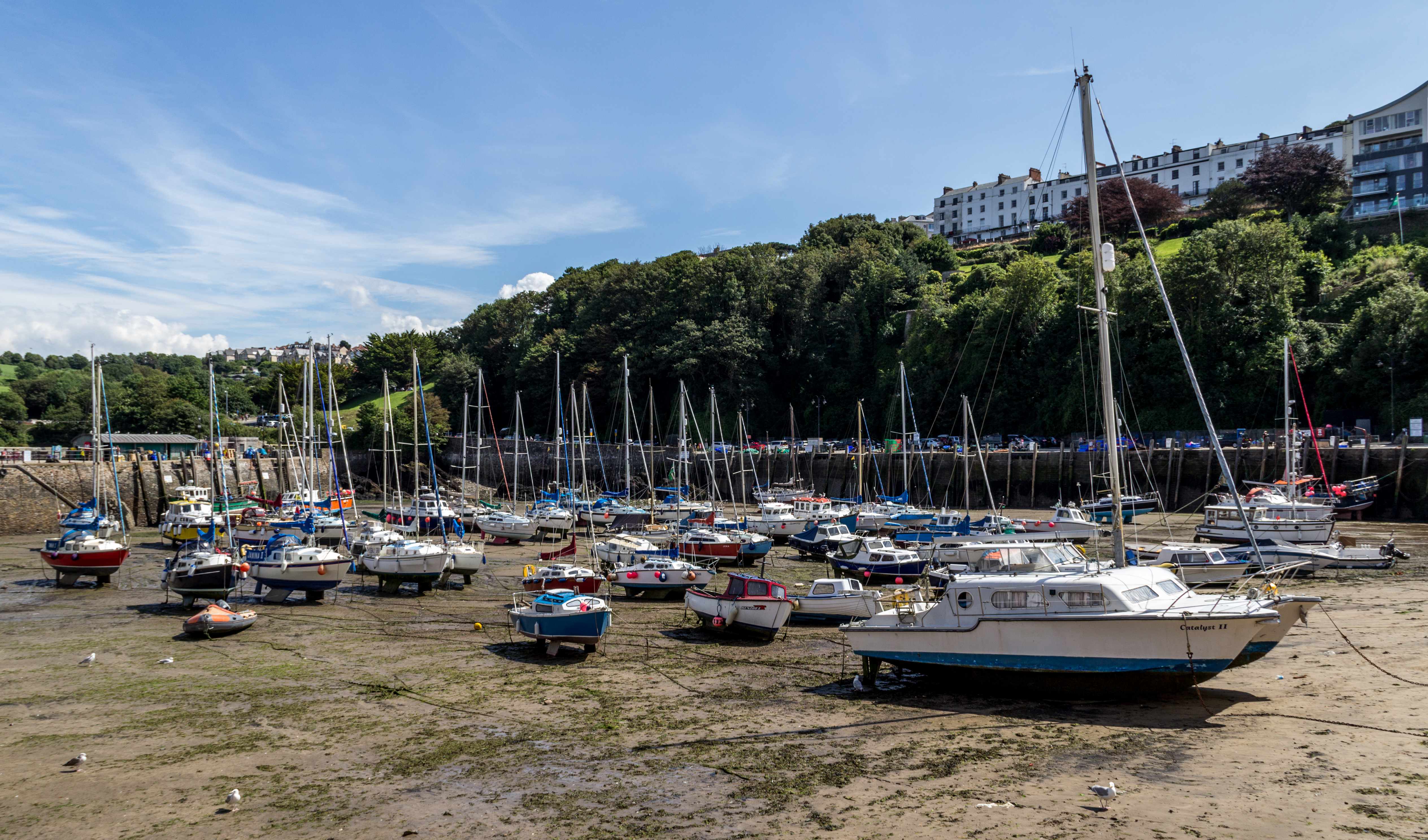 Harbour of Ilfracombe, Devon, England